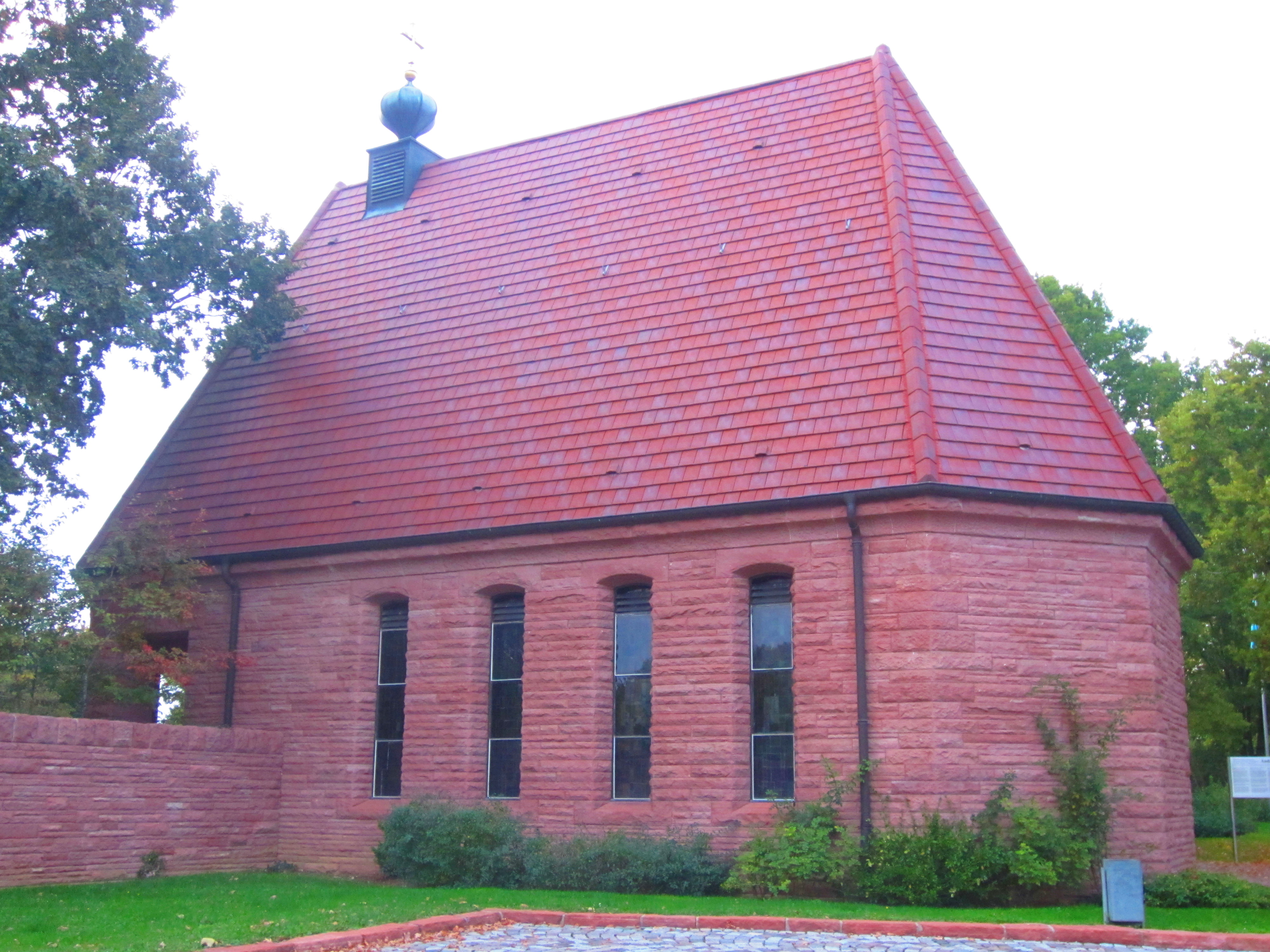 Cimetiere militaire allemand Andilly